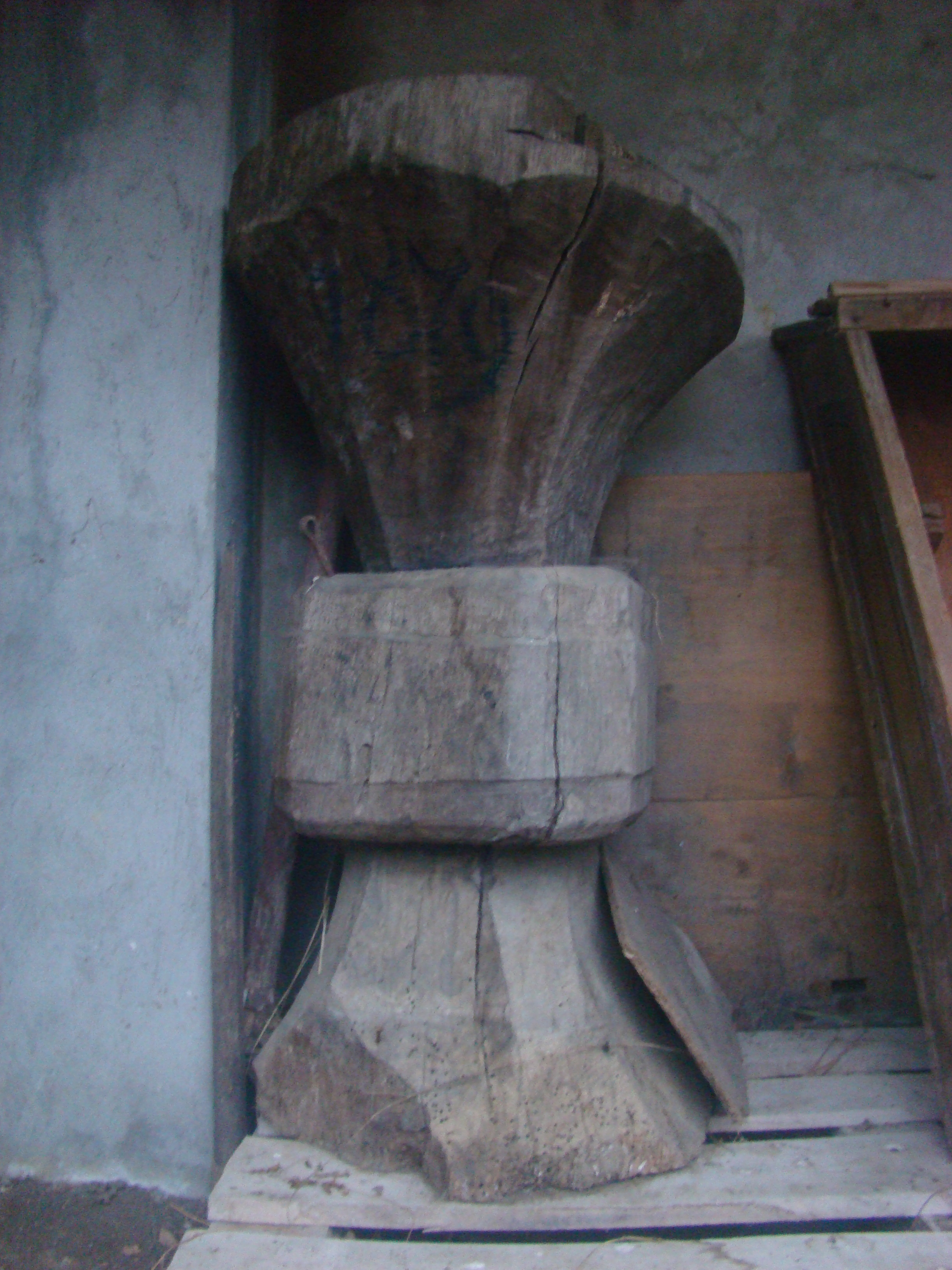 Biserica de lemn "Sfântul Petru" din Mureșenii de Câmpie